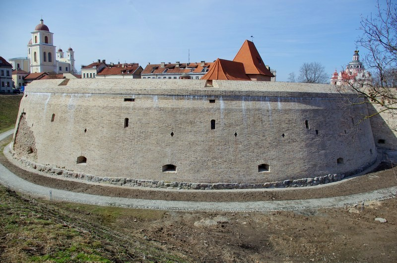 Vilniaus gynybinės sienos bastėja